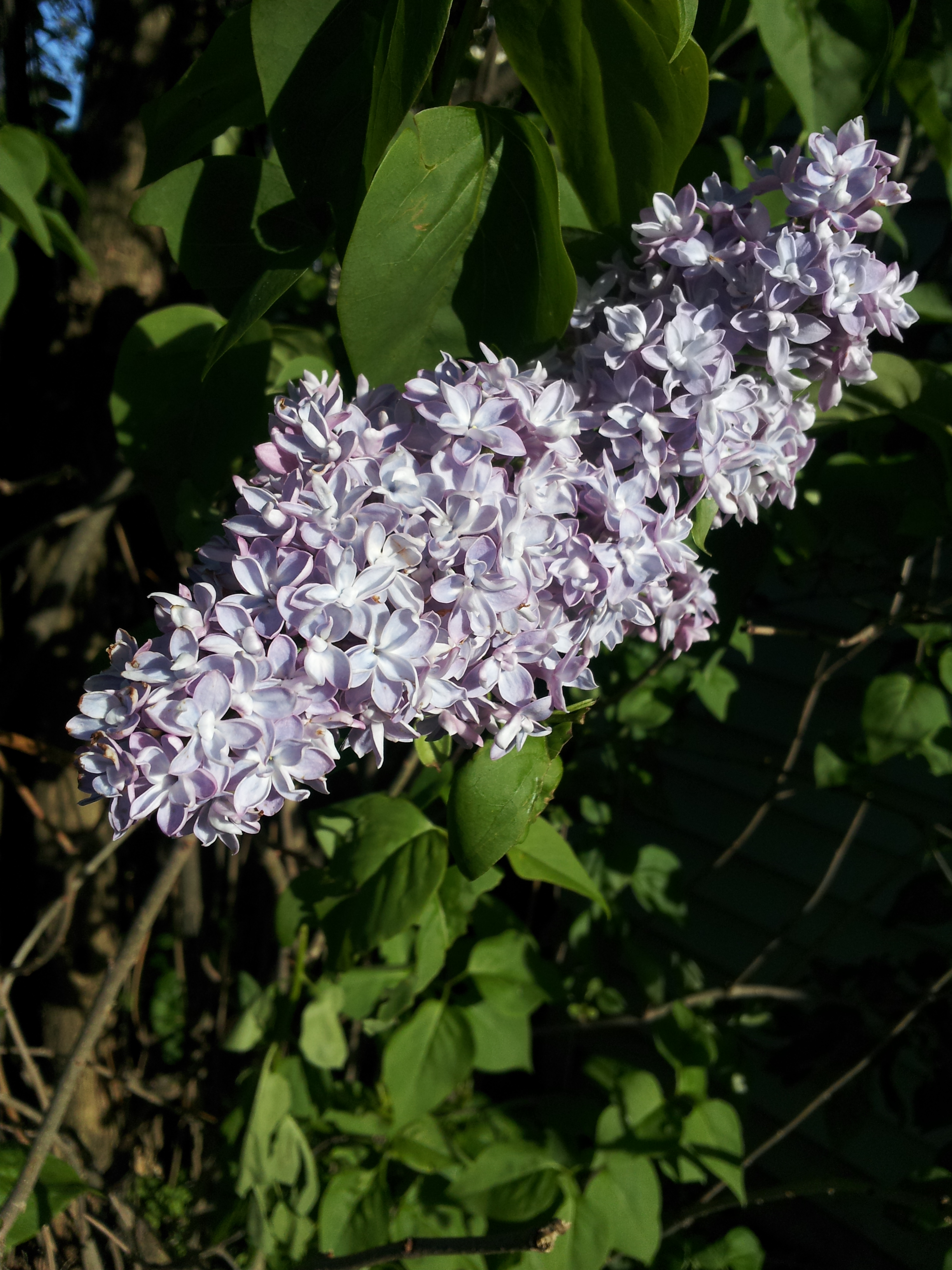 lilac bush